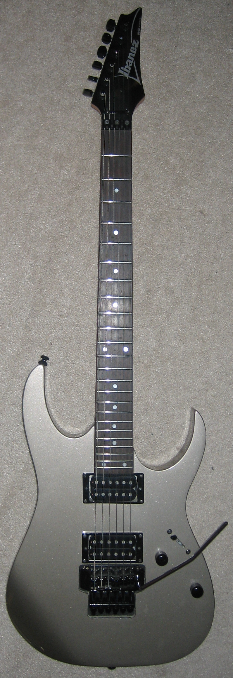 Ibanez RG220 Electric Guitar